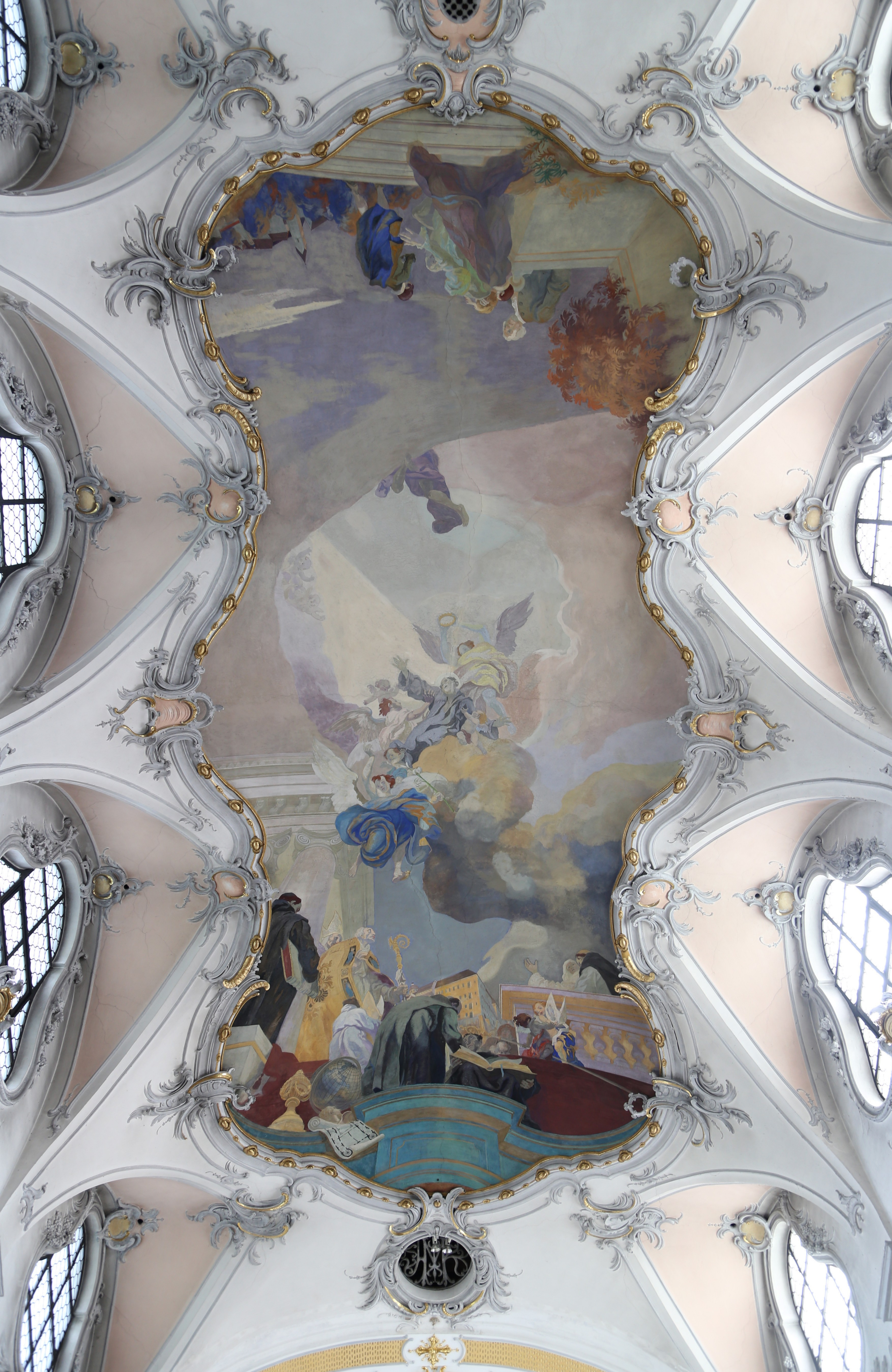 Kloster Scheyern;Katholische Pfarr- und Benediktinerabteikirche Mariä Himmelfahrt, dreischiffige Basilika mit zweijochigem Chor mit Apsis und ursprünglich freistehendem Südwestturm mit Blendengliederung und Helm über Dreiecksgiebeln, Mittelschiff und Chor mit Stichkappentonnen, Seitenschiffe mit Kreuzgratgewölben, im Kern romanisch, geweiht 1215, Turm um 1230